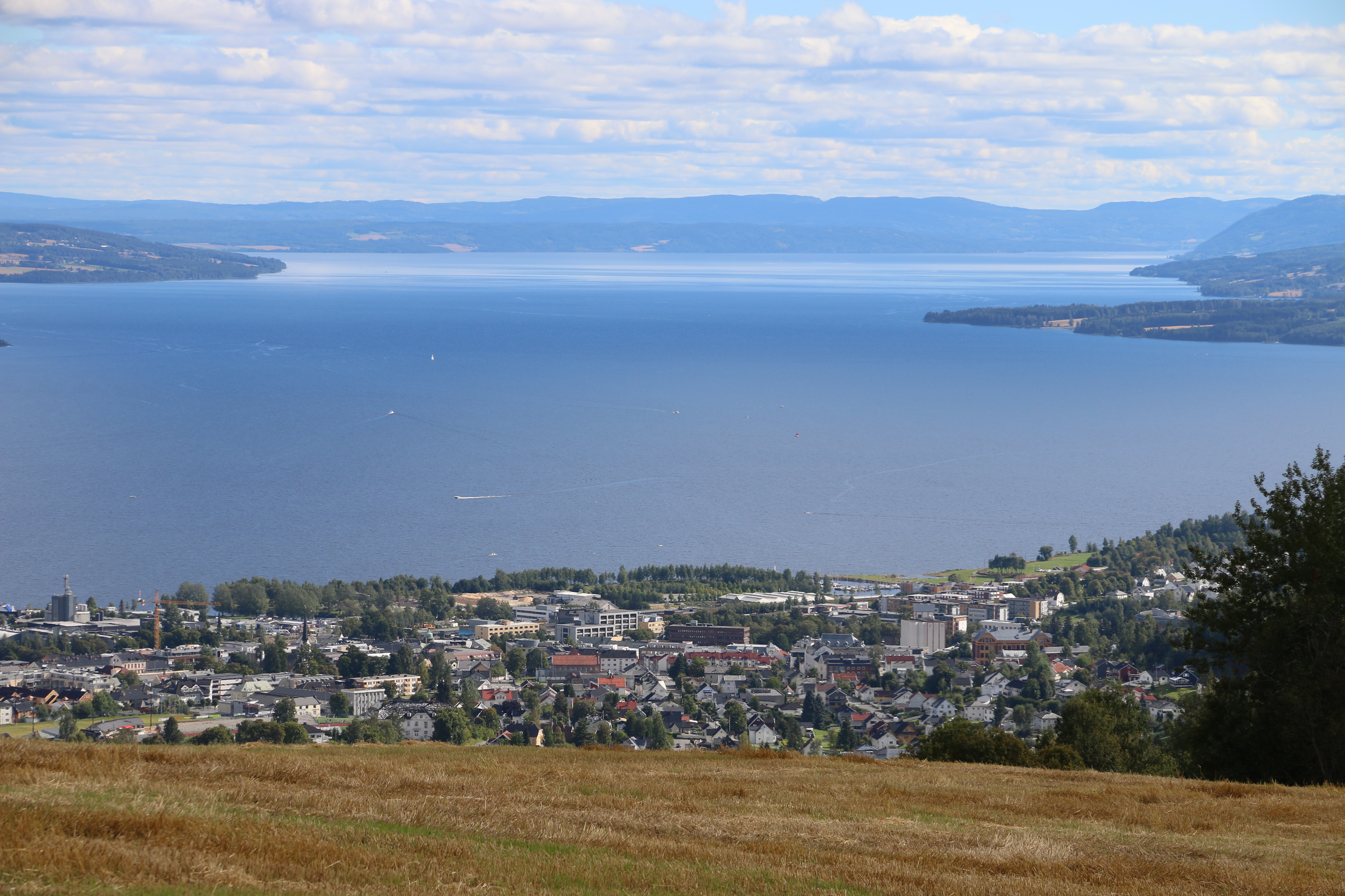 Gjøvik and Lake Mjøsa seen from Øverby September 2016.